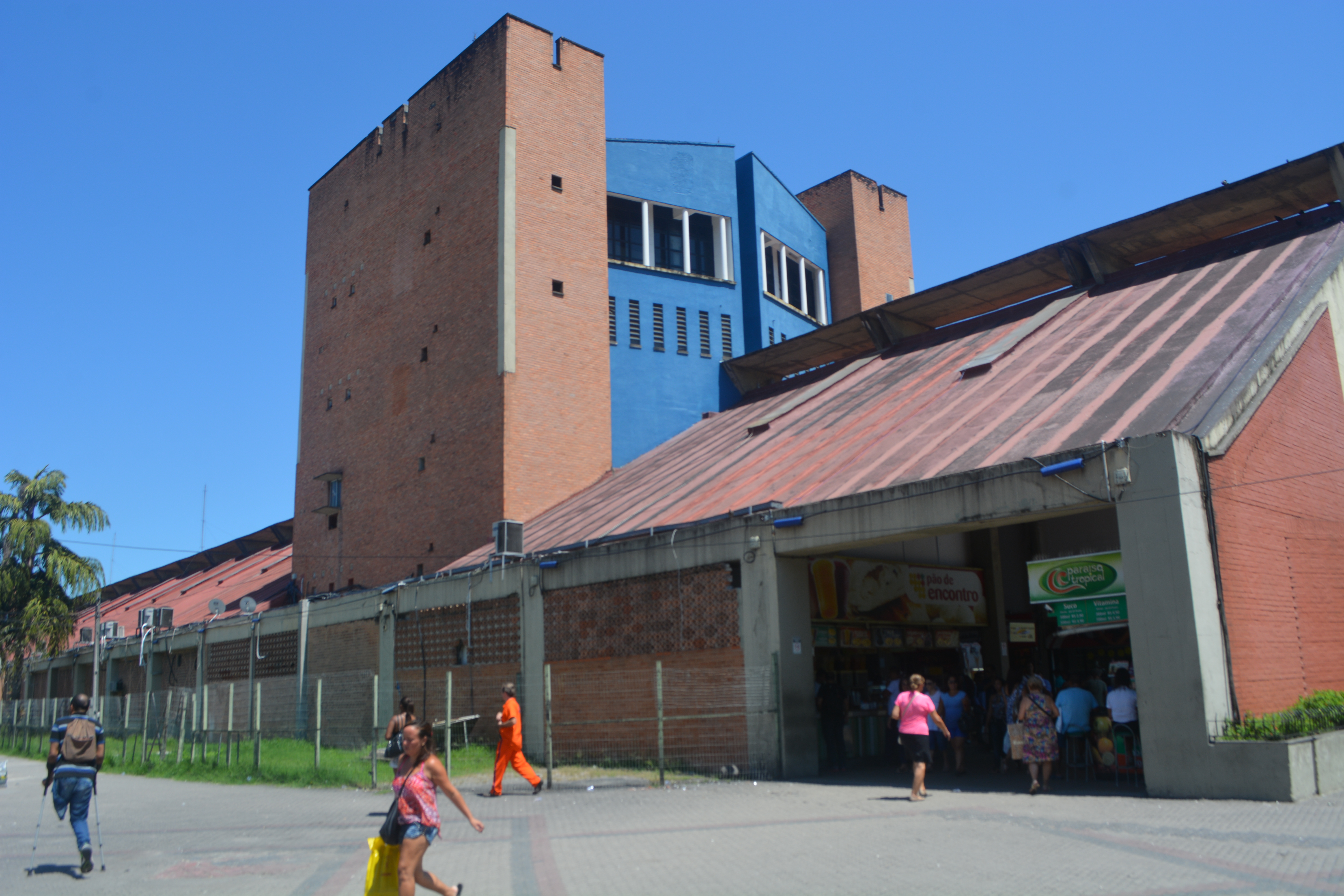 Entrada lateral